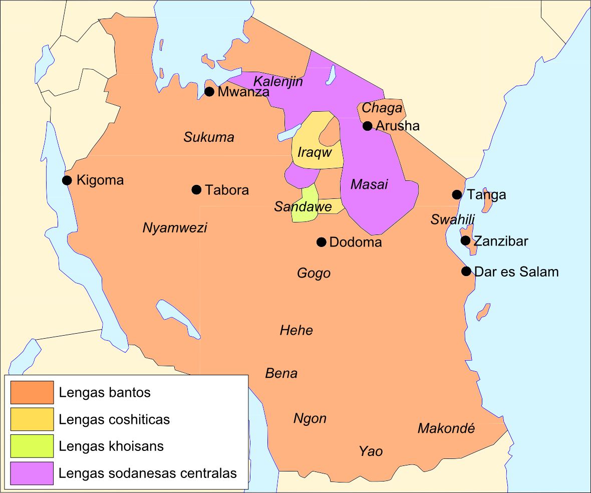 Lengas principalas de Tanzania.